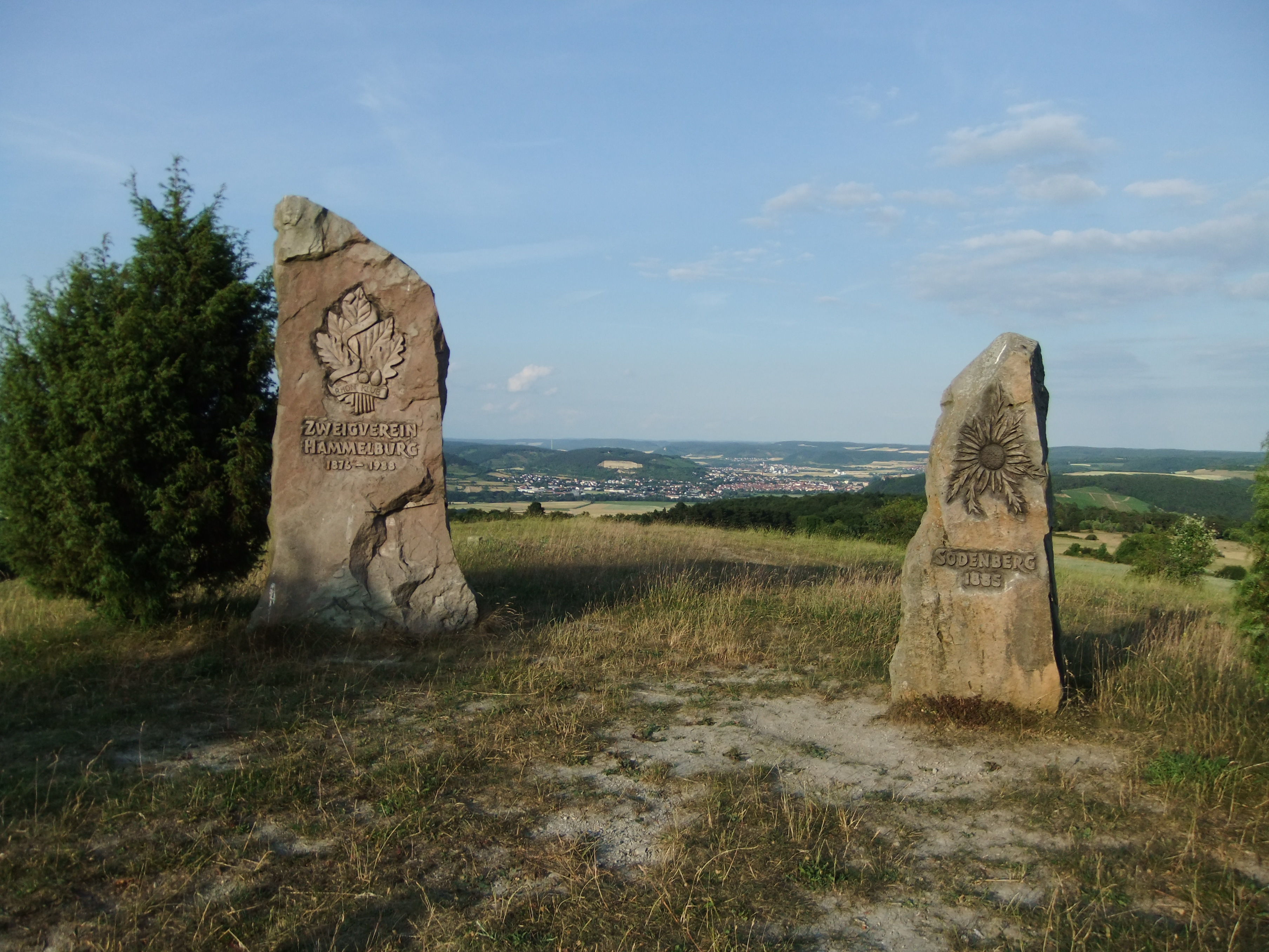 (NSG:BY-NSG-00540.01)_Sodenberg-Gans